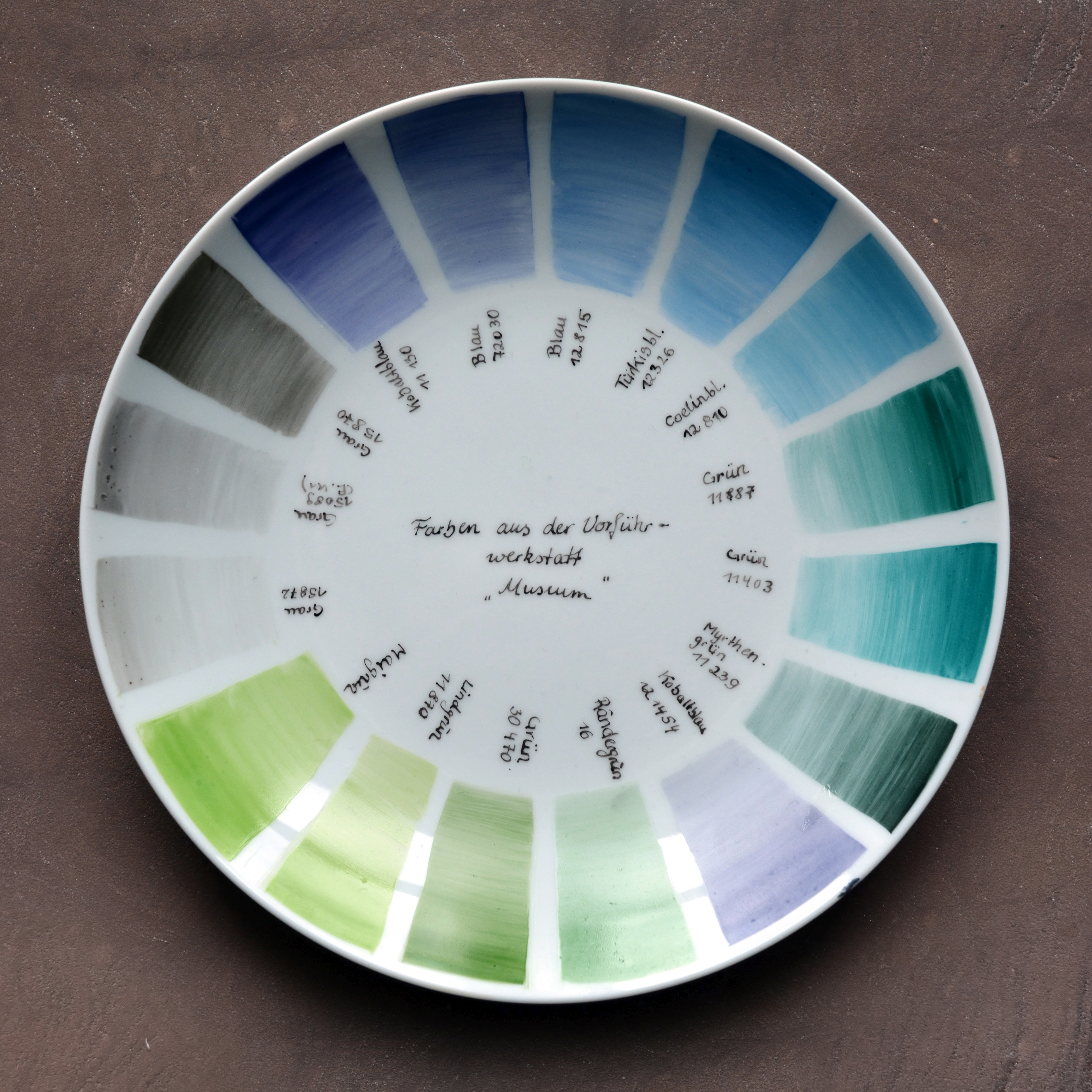 Impressionen vom Porzellanmuseum Schloss Fürstenberg Besucherwerkstatt, Porzellanfarben